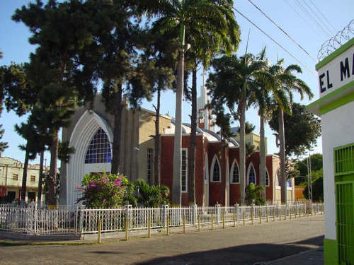 Iglesia Virgen Del Valle final de Av Bolivar El Tigre